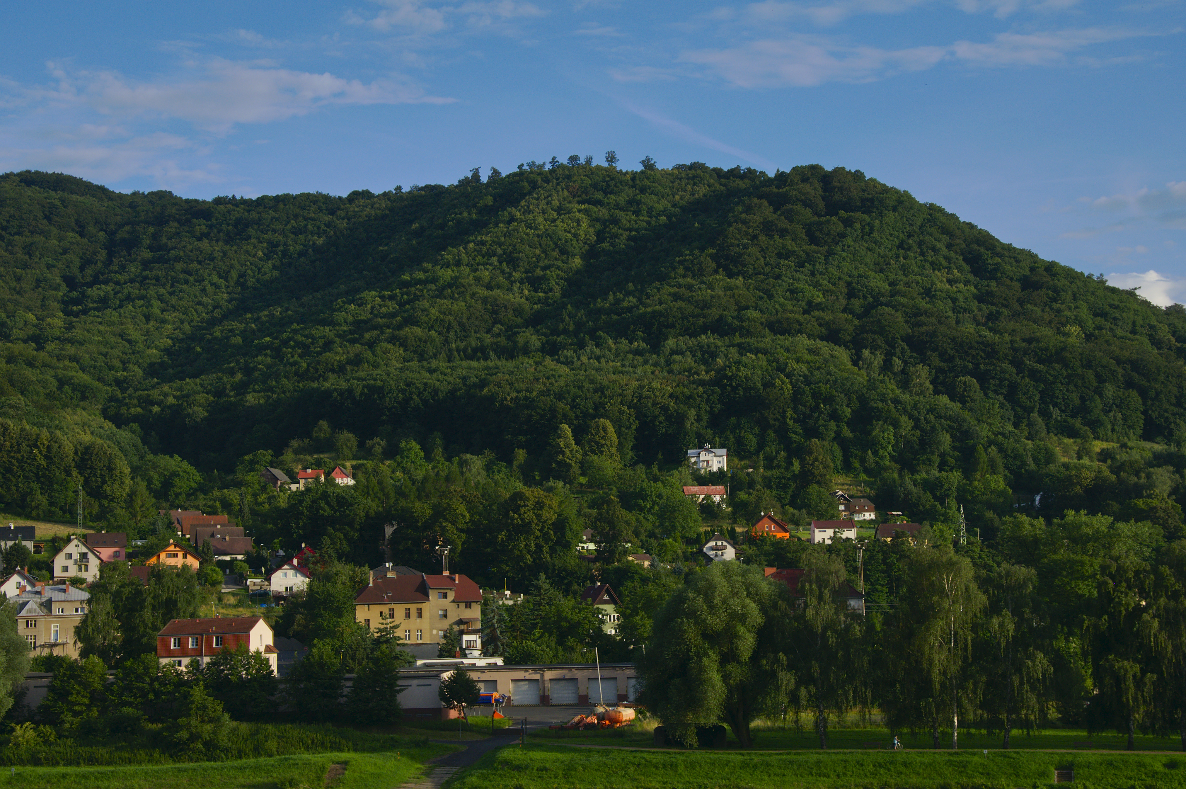 Obec Velké Březno, okres Ústí nad Labem